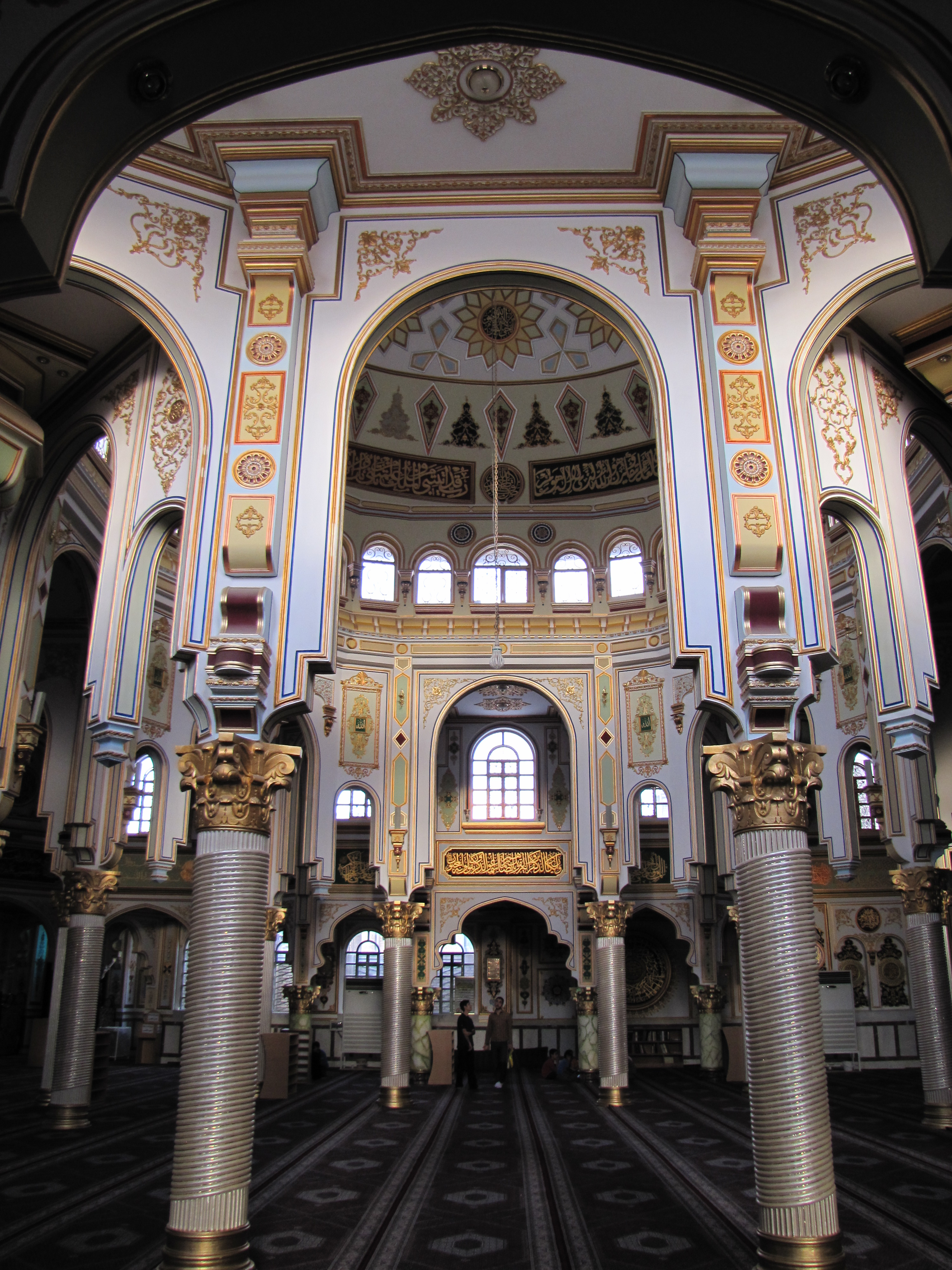 jame shafeiee mosque, kermanshah, iran